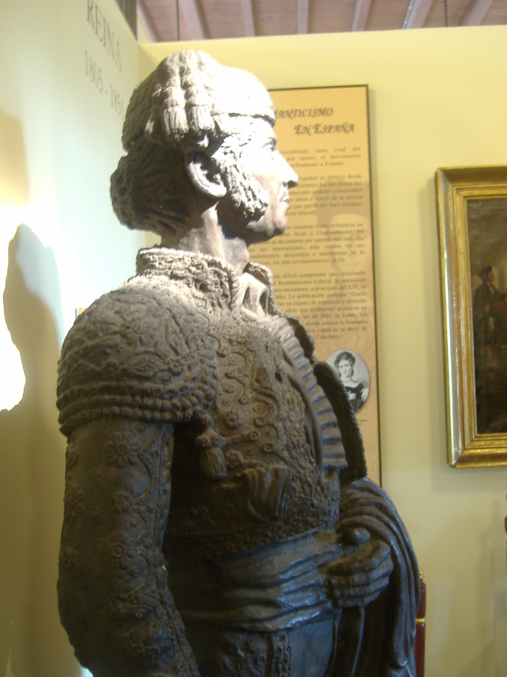 Paquiro1. Museo Taurino Chiclana